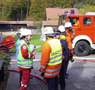 Übung 2004, Brandübung in Zusammenarbeit mit der Feuerwehr